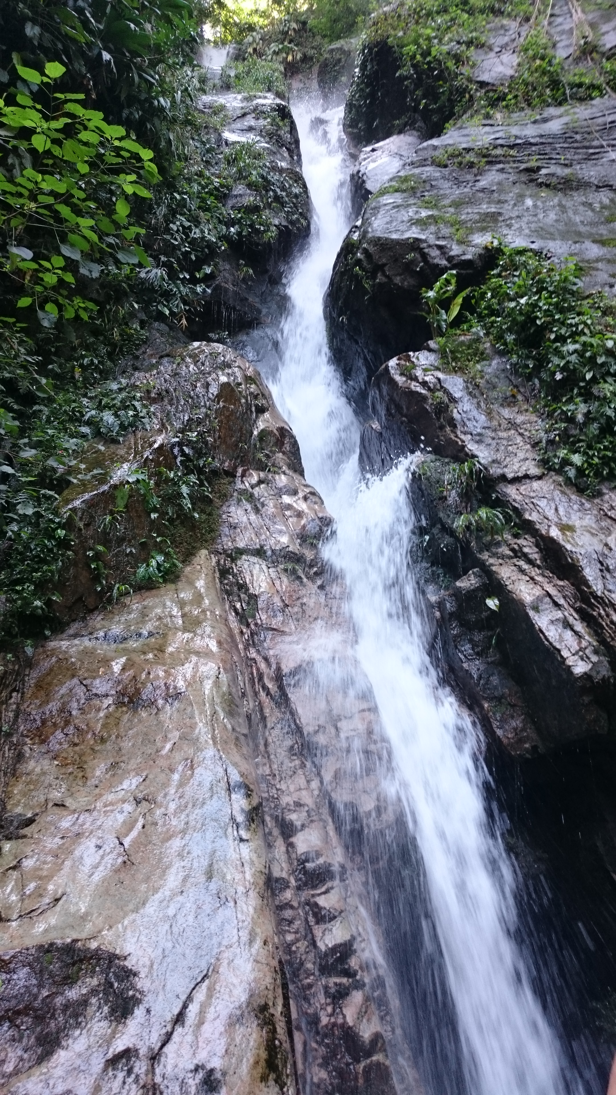 Em Cachoeira de Guapimirim